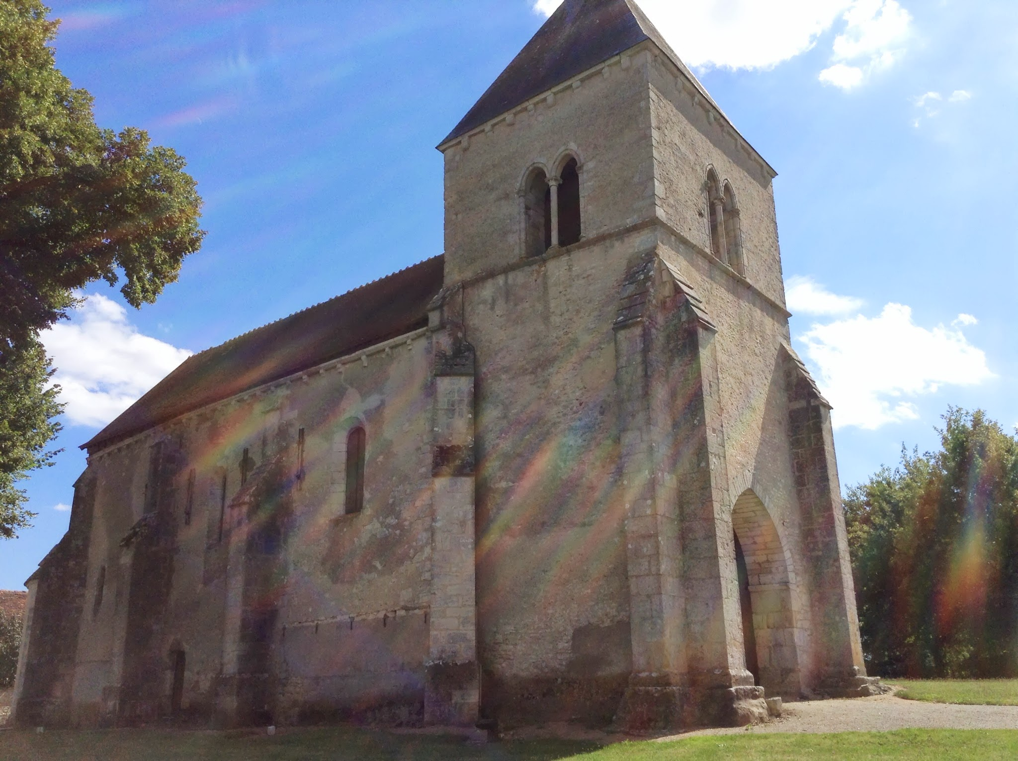 Église Saint-Symphorien, Saint-Symphorien (Cher)